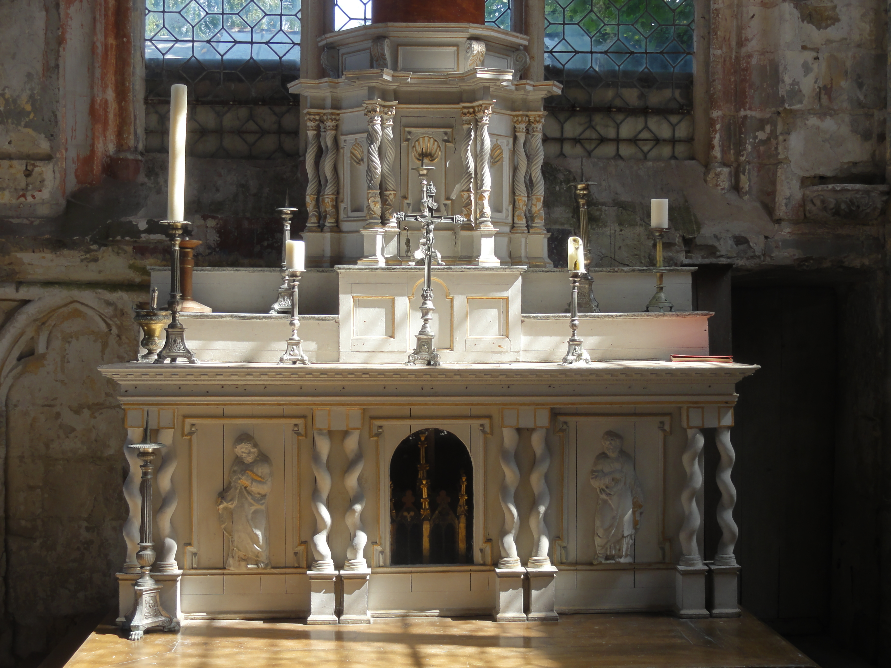 Maître-autel.